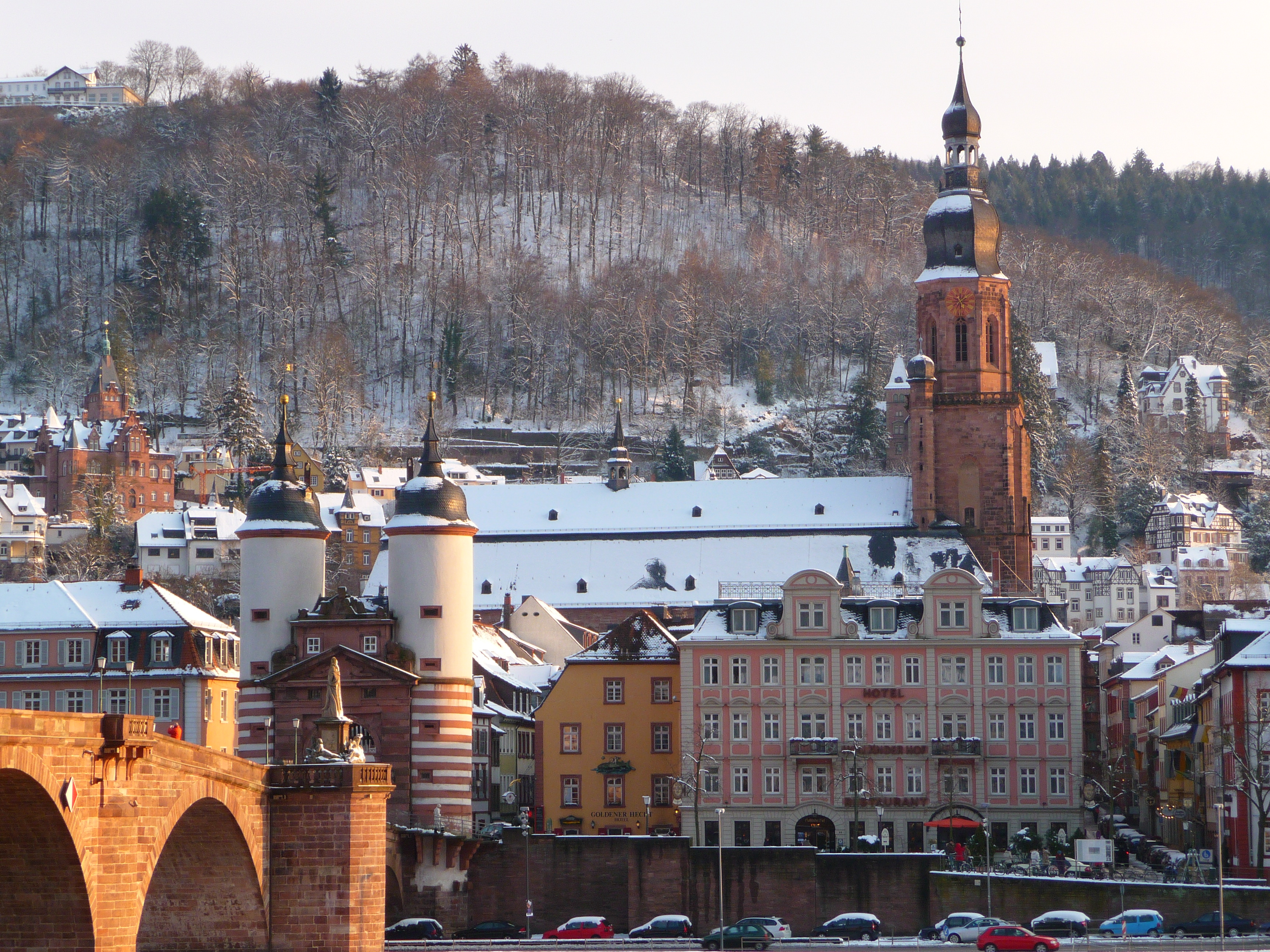 Hotel "Holländer Hof" in der Heidelberger Altstadt neben der Alten Brücke, dahinter die Heiliggeist-Kirche (Baden-Württemberg, Deutschland)